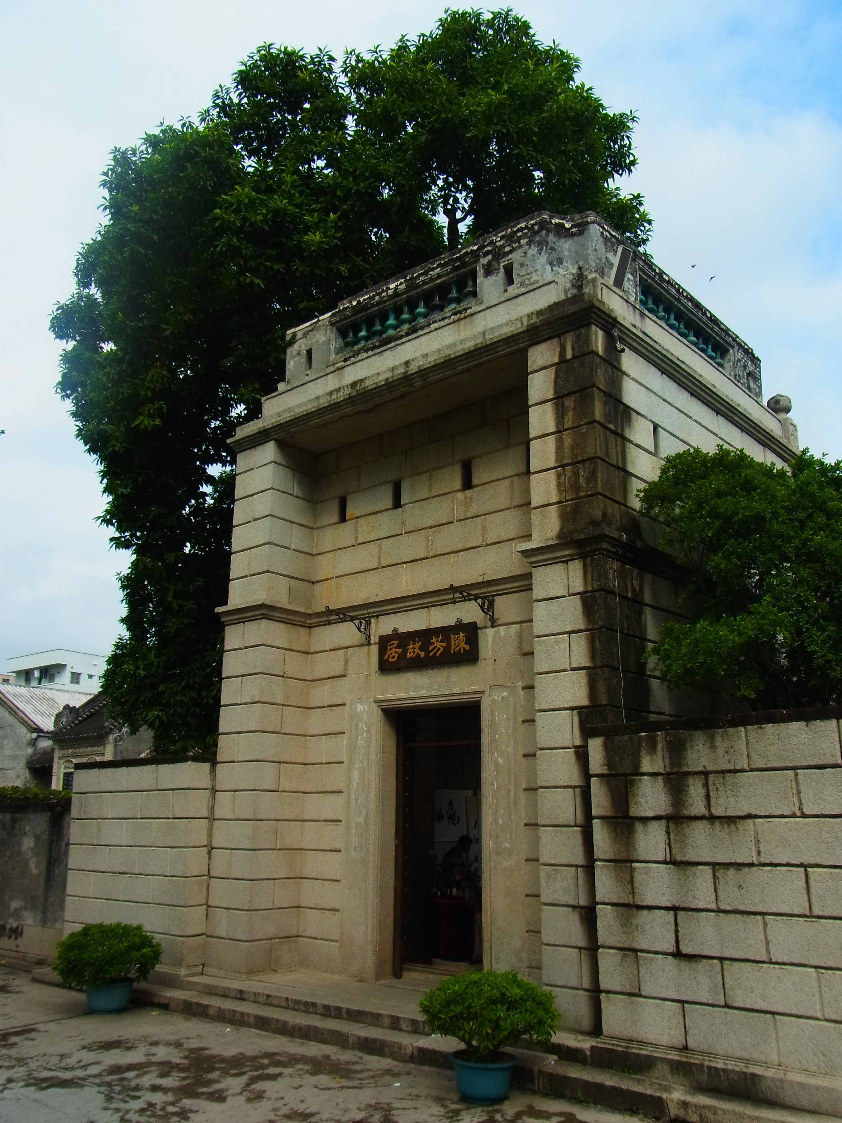 中文（香港）: 陳芳故居